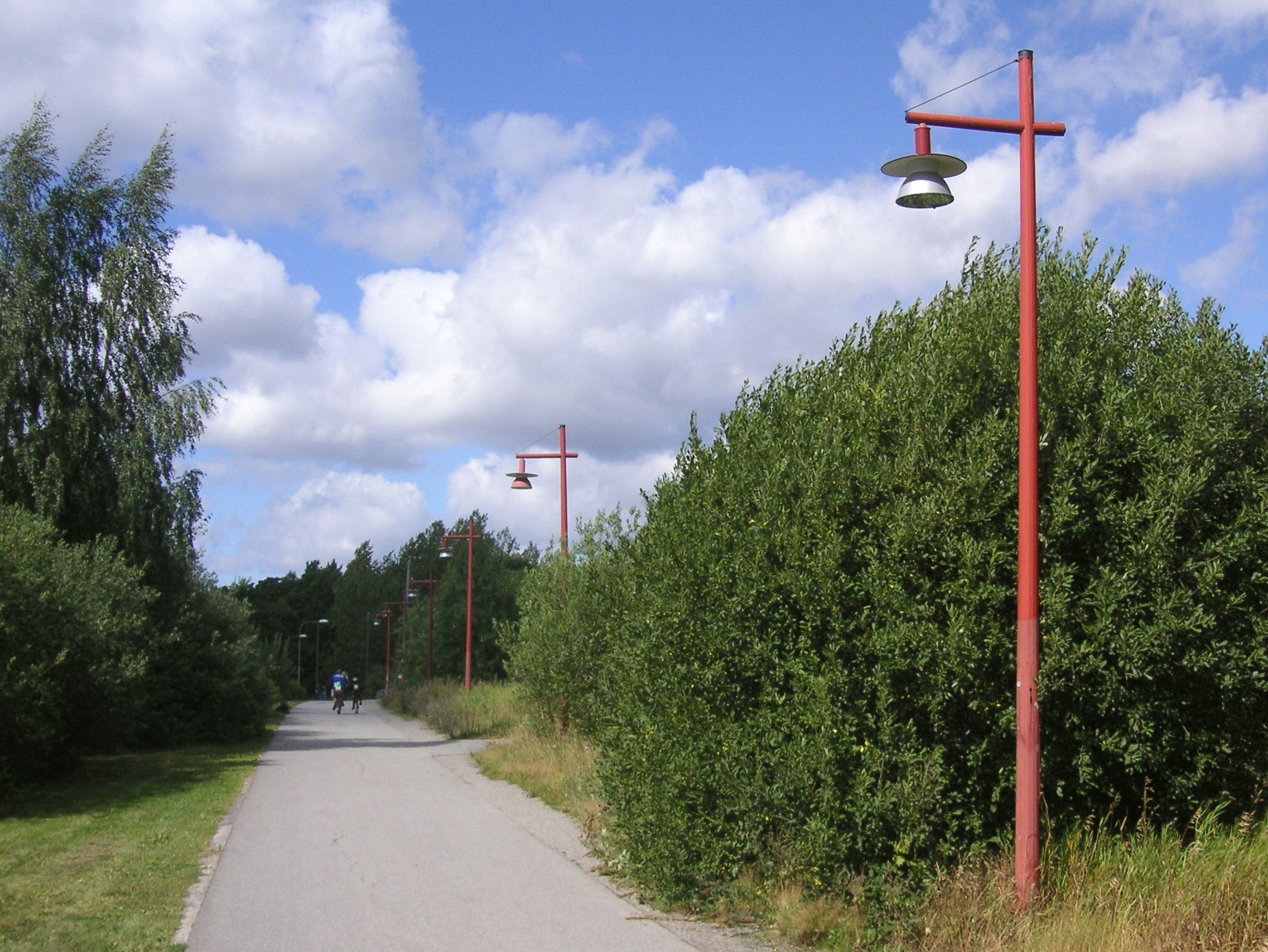 Skarpnäcksvägens östra del är numera en promenadväg